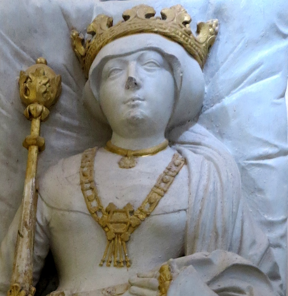 Grabplatte der Gertrud von Sulzbach in der Abteikirche des Kloster Ebrach - Detail